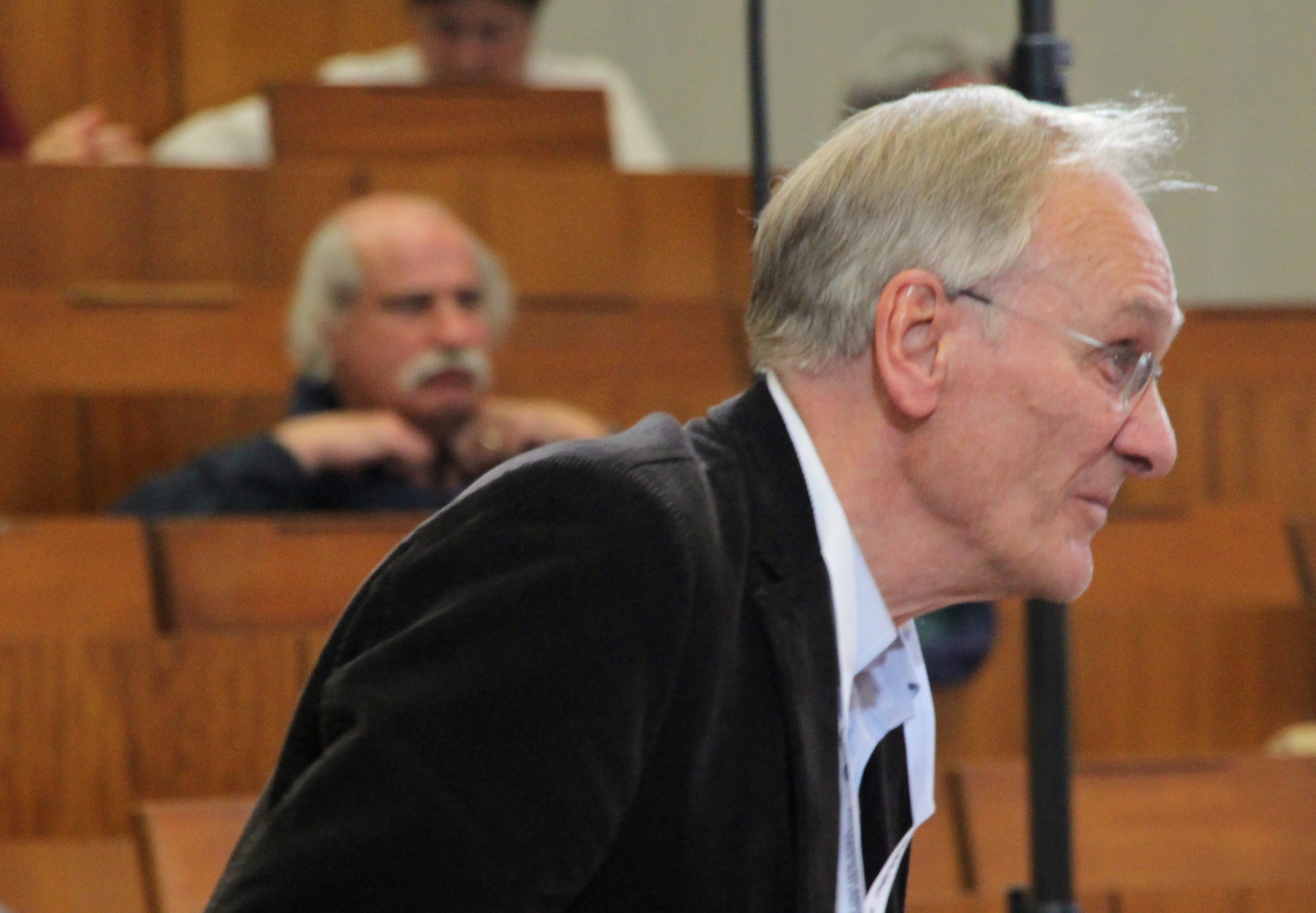 Historikertag 2014 in Göttingen.